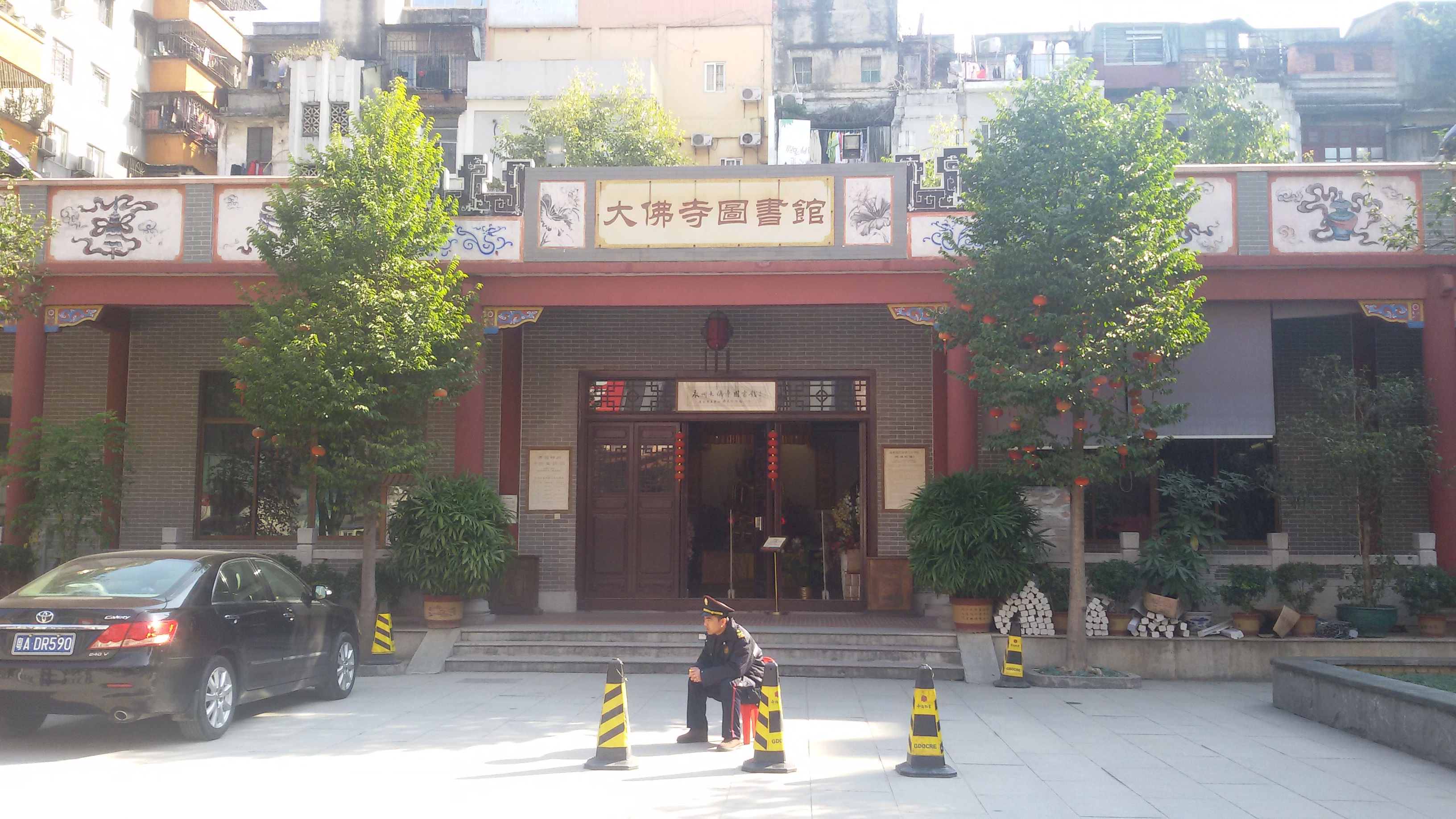 粵語: 喺大佛寺入面嘅圖書館